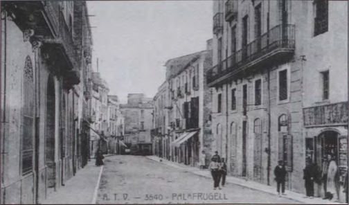 Imatge del Cine Modern i el Varietats (fons Àngel Toldrà Viazo (Barcelona, 1867 - 1956))